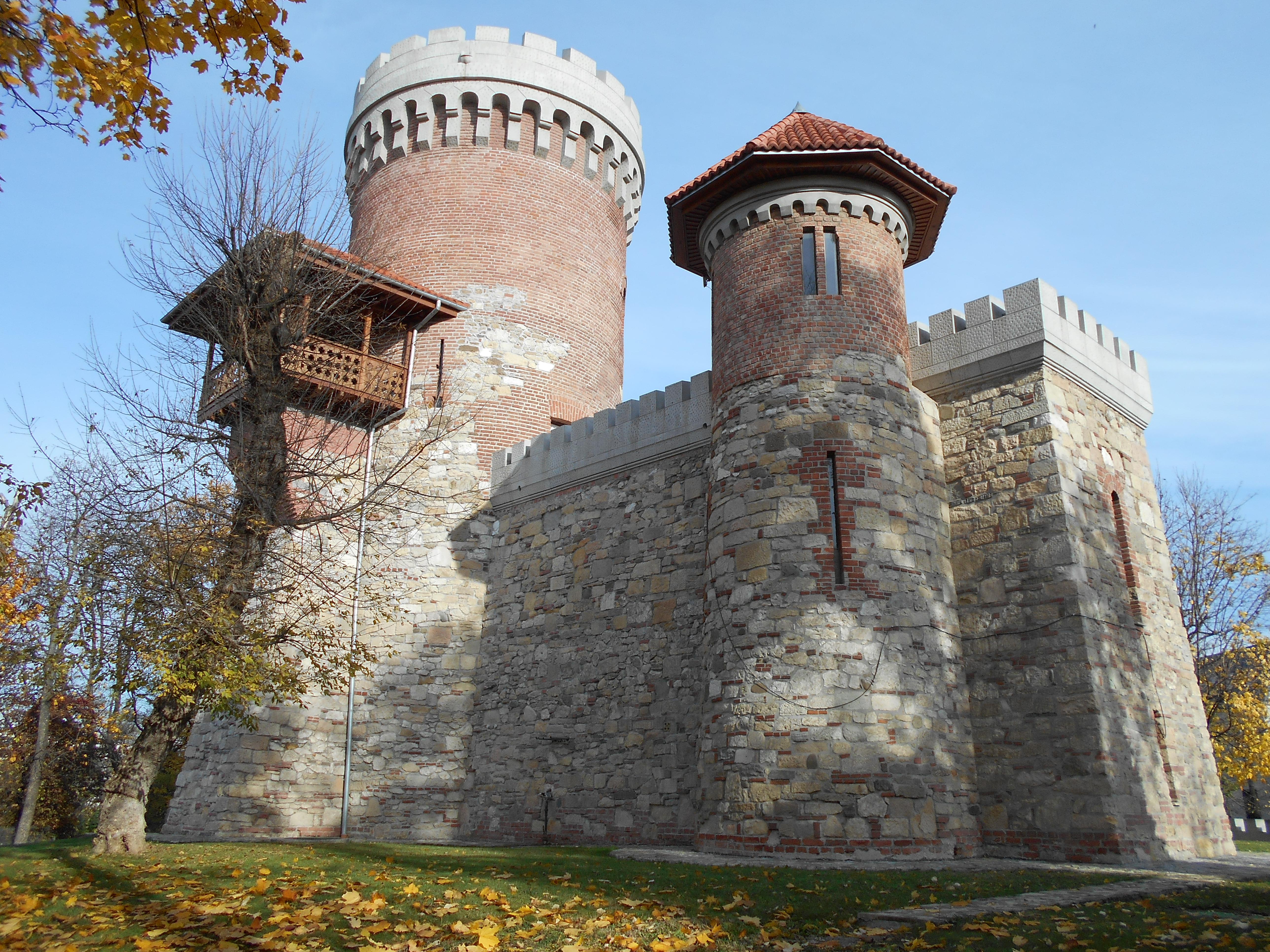 Castelul Vlad Țepeș din București- Vedere din Parcul Carol I (2)